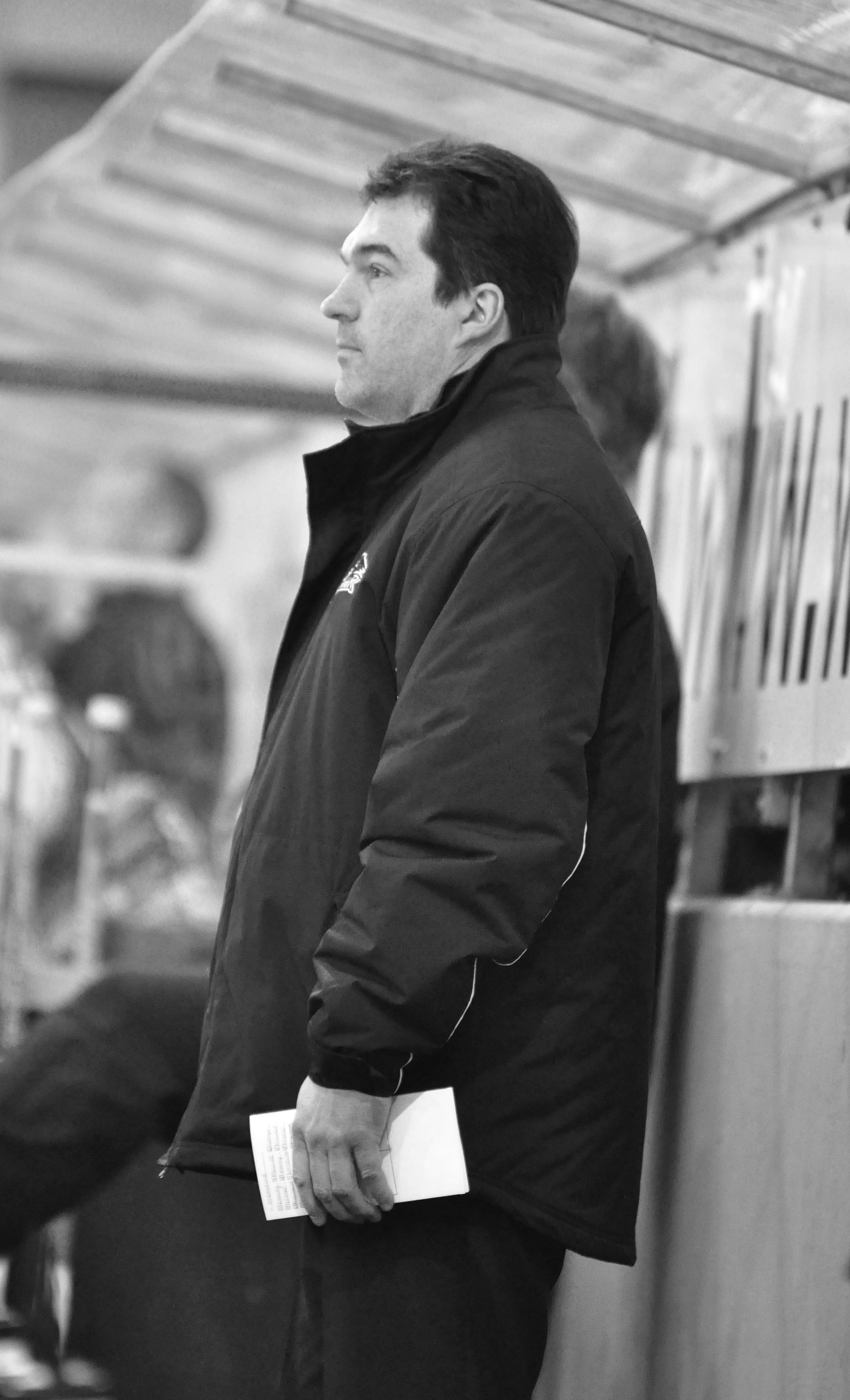 Straubing Tigers - Augsburg Panther 04.03.2012 DEL Deutsche Eishockey Liga